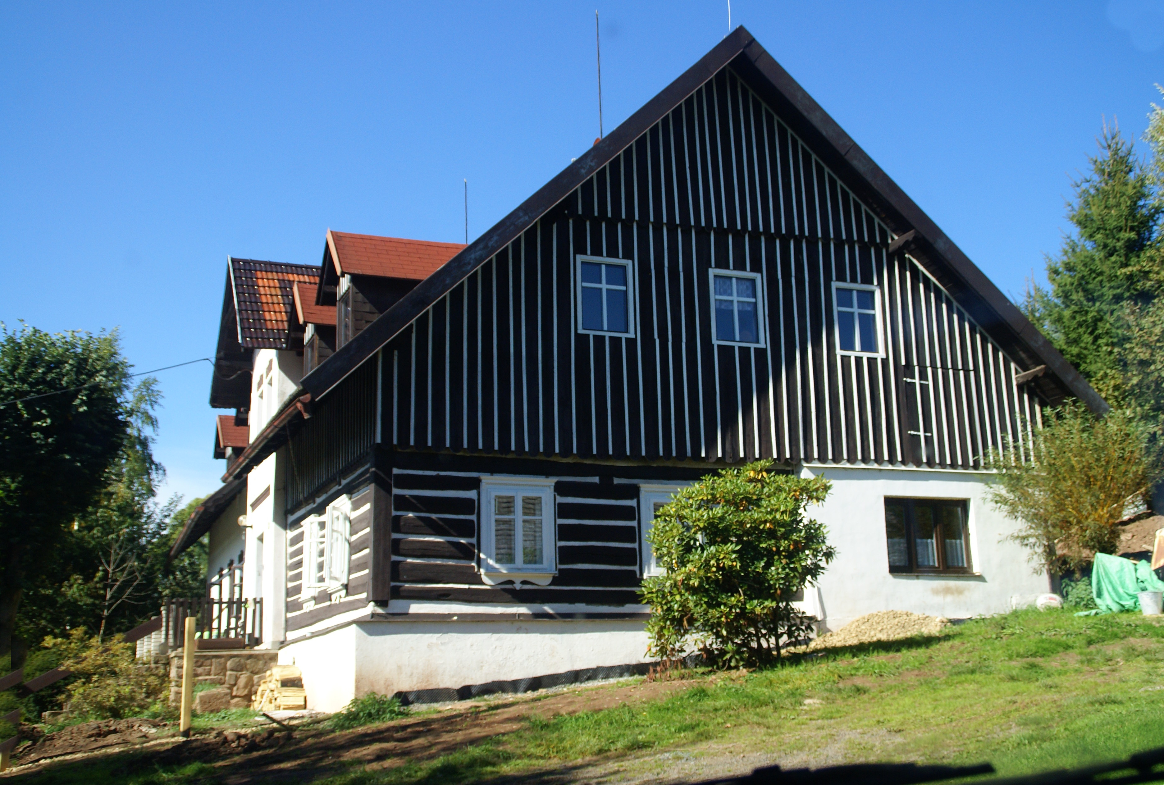 Venkovský dům (Benešov u Semil), Benešov u Semil 105